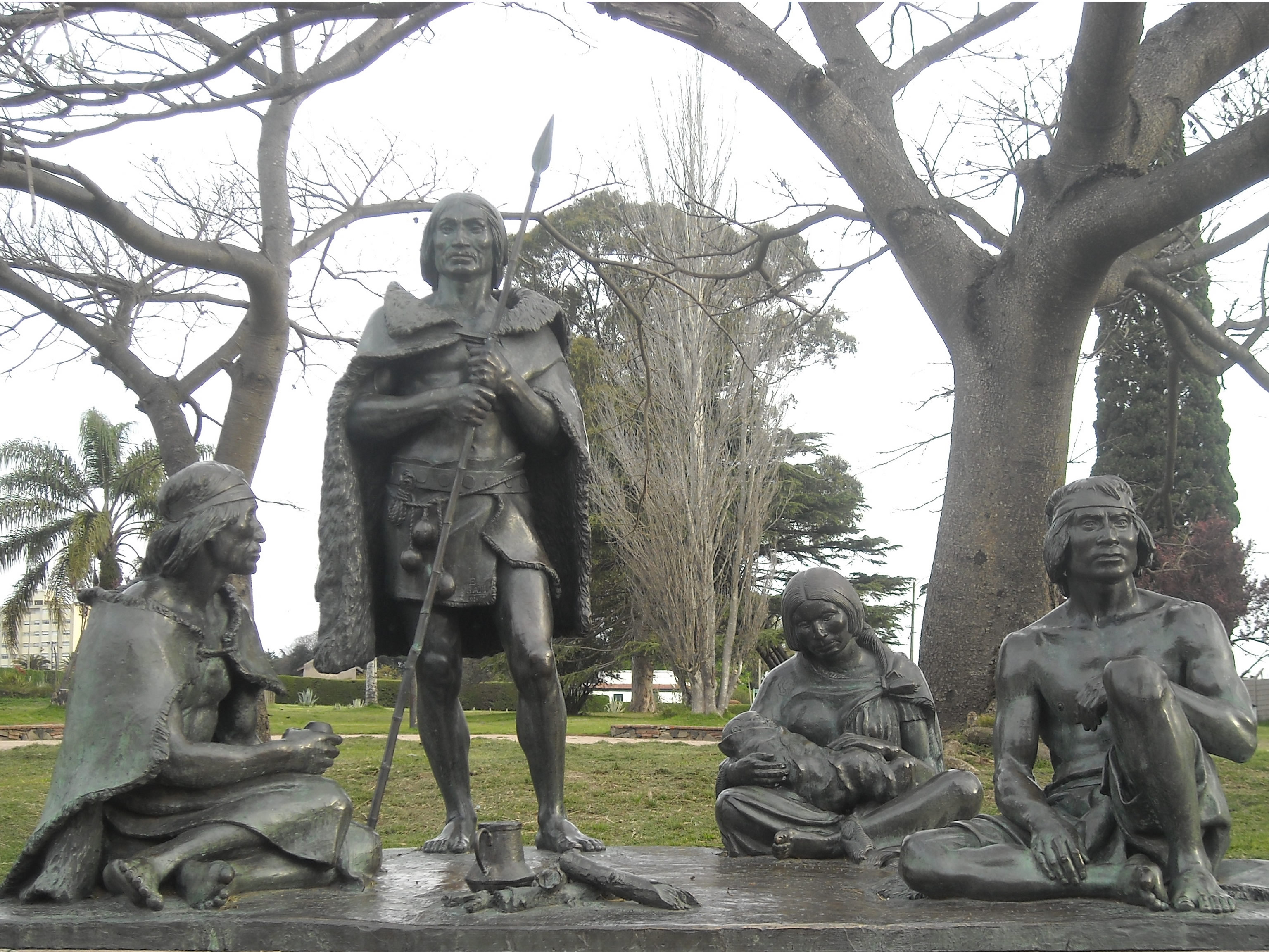 Los últimos charruas. Ubicada en el departamento de Montevideo